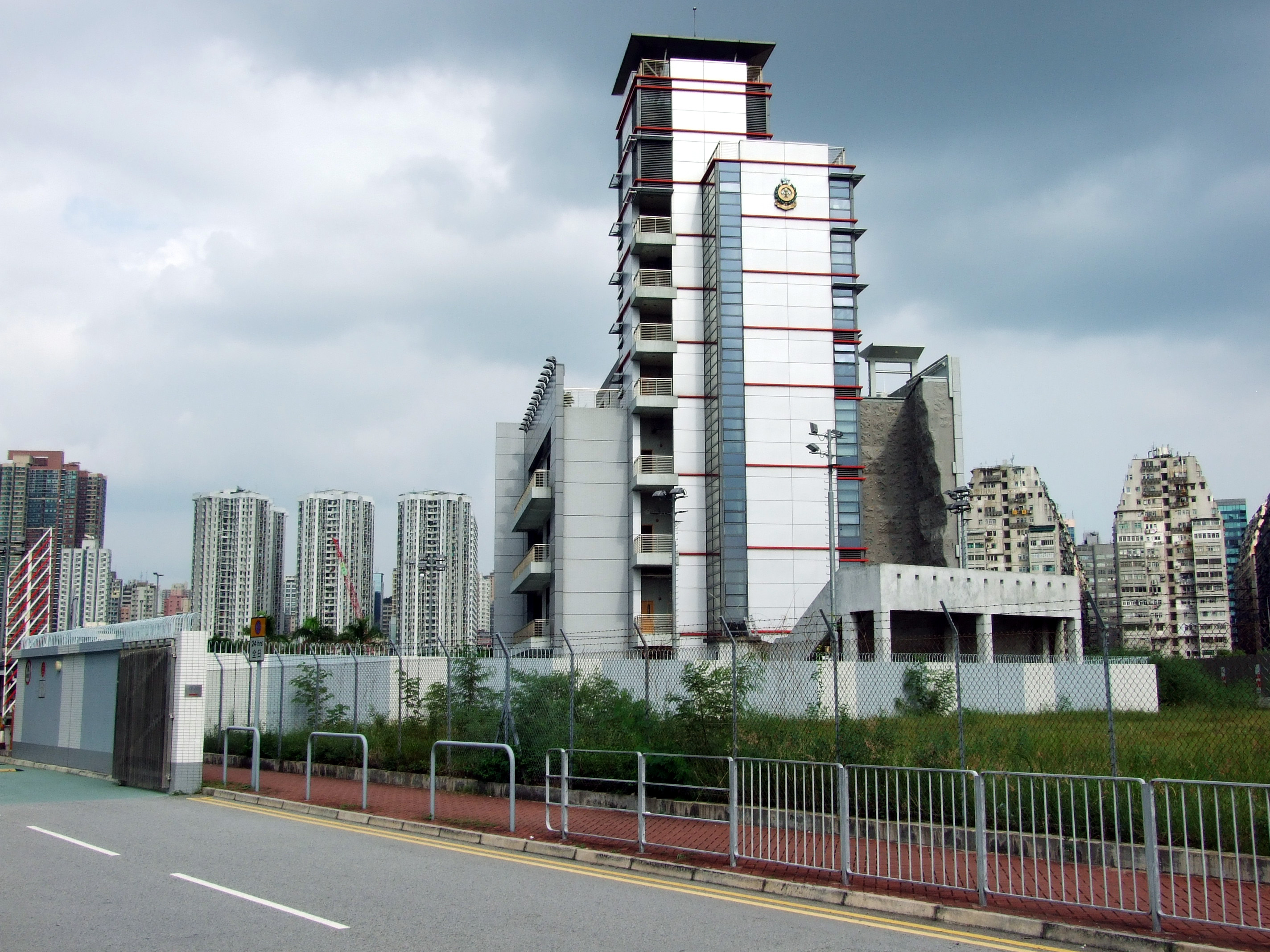 中文（香港）: 香港消防處西九龍救援訓練中心